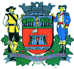 Brasão do município de: Jundiaí, São Paulo, Brasil